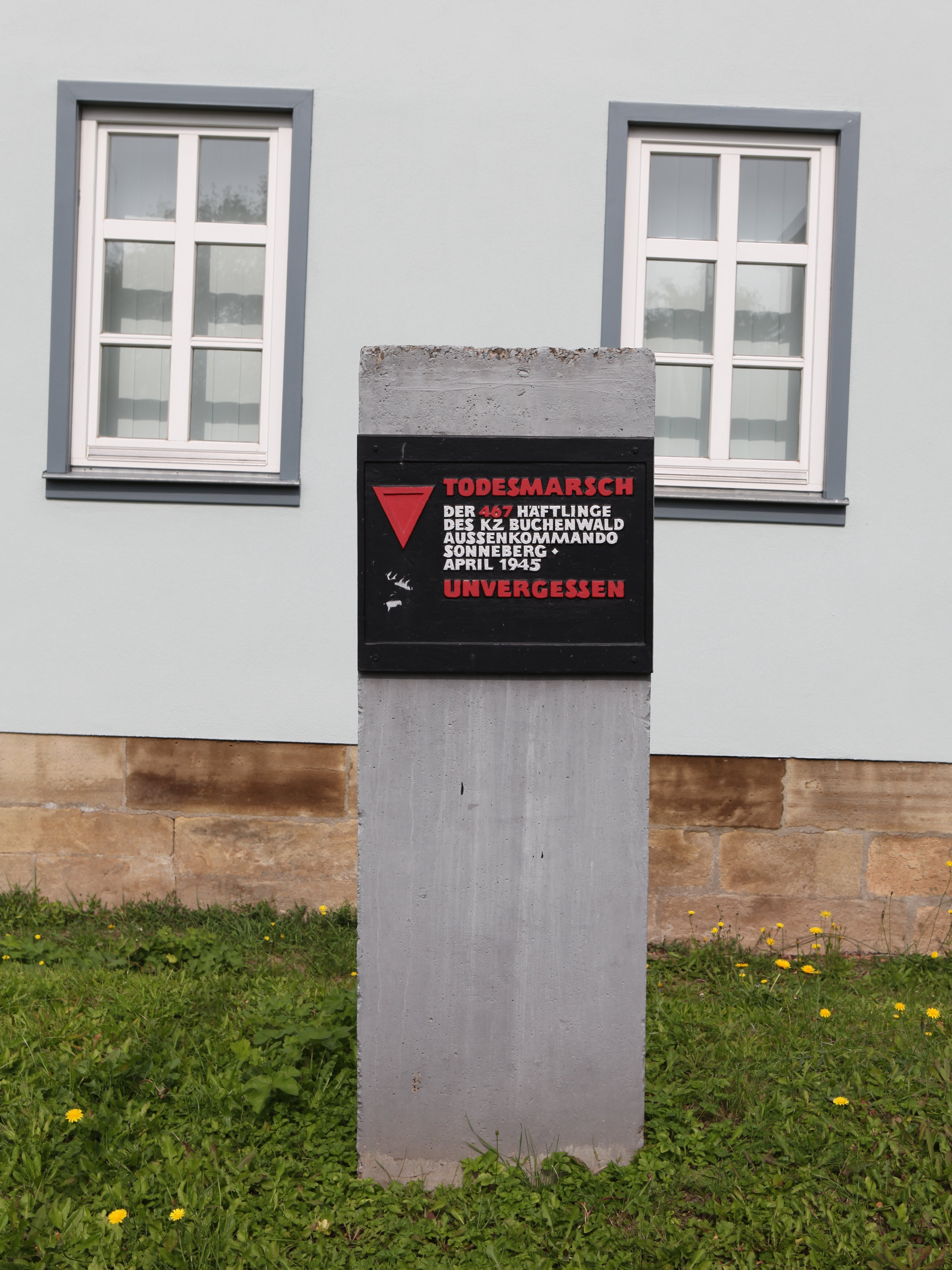 Gedenktafel Todesmarsch der Häftlinge des KZ Buchenwald Außenkommando Sonneberg, 1980, Bettelhecker Straße 24